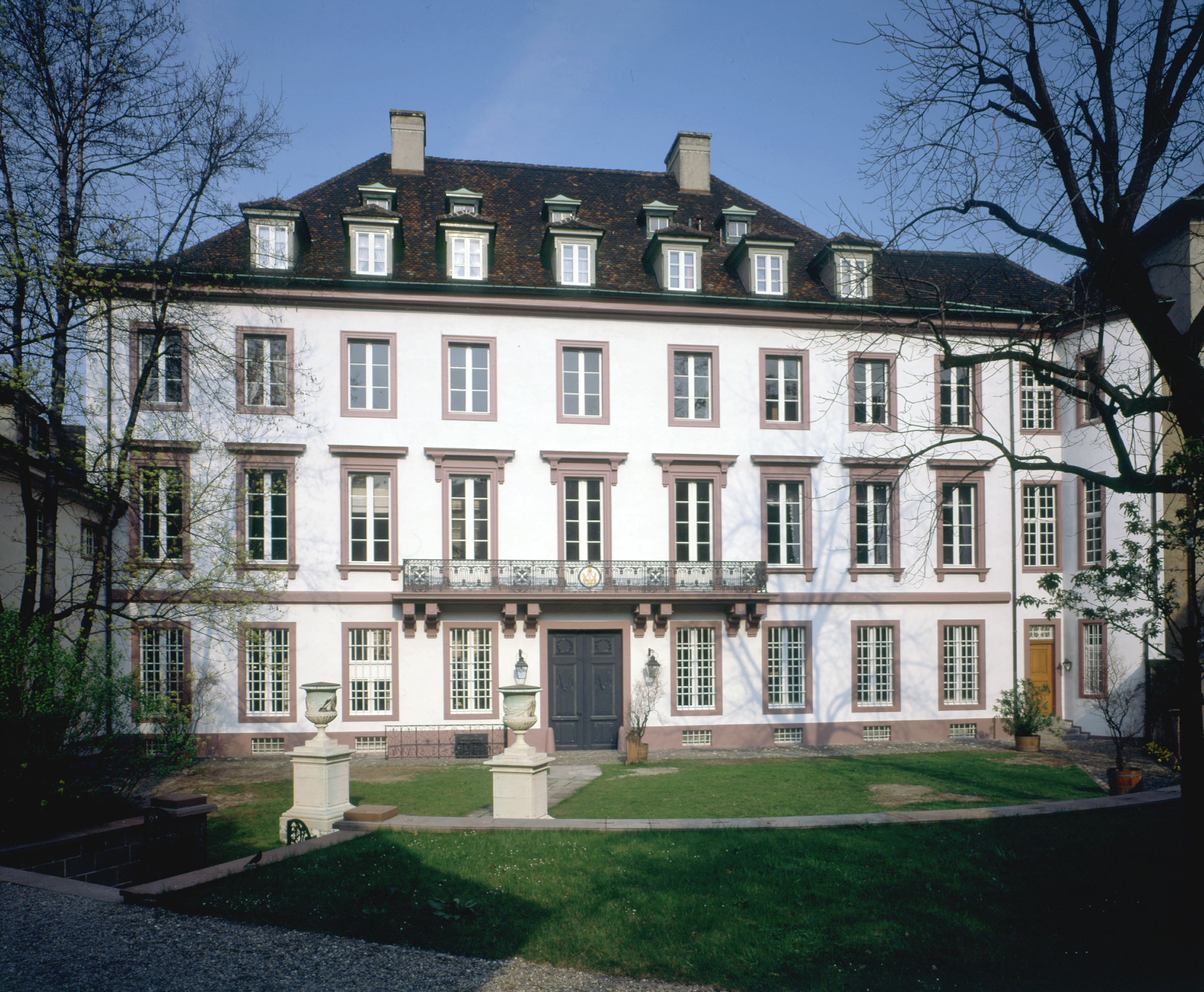 LangSwitch Error: no default